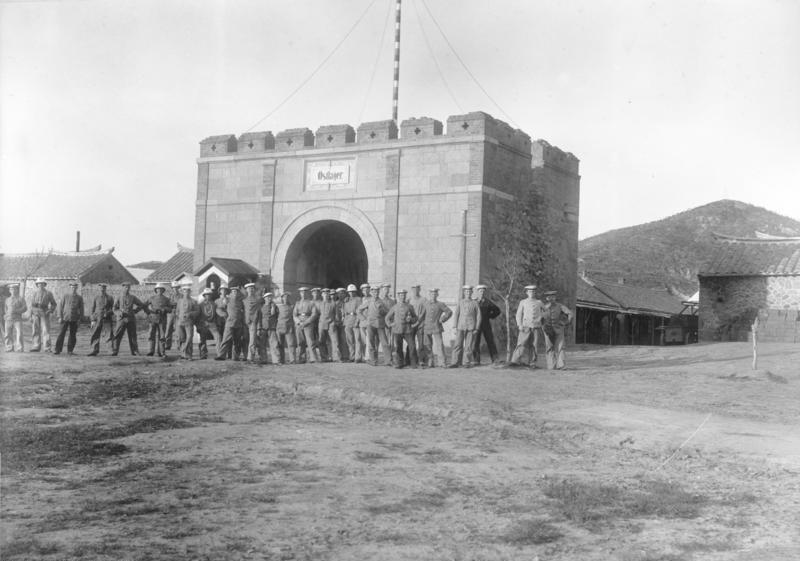 China, Tsingtau China, Tsingtau [China, Tsingtau Soldaten stehen vor einem Tor; das Tor trägt die Aufschrift "Ostlager"]